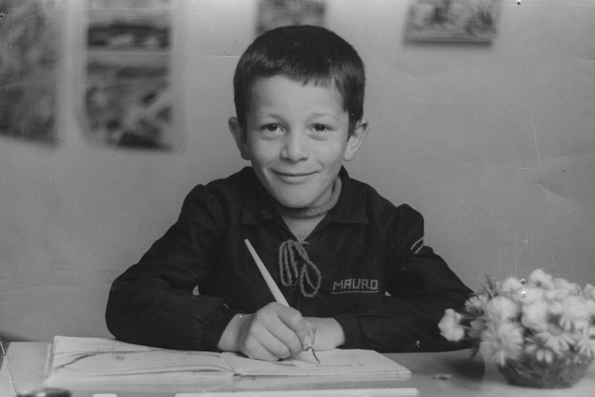 Mauro Corona bambino